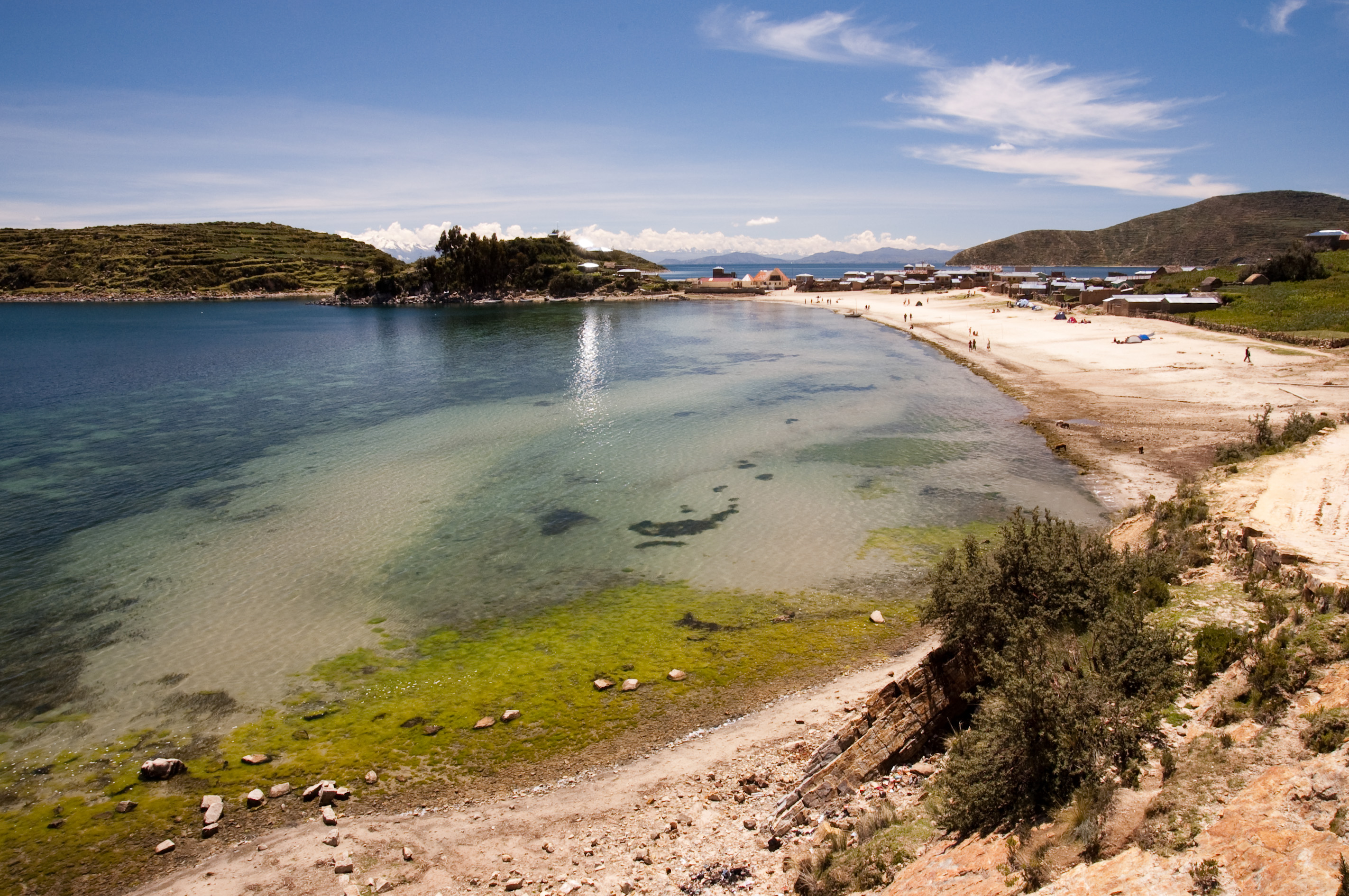 playa en la isla del sol en el lago Titicaca, Bolivia.